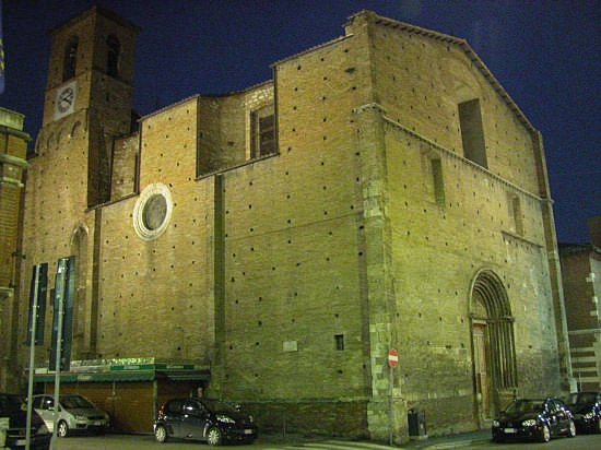 Teramo, vista notturna della chiesa di Sant'Antonio.